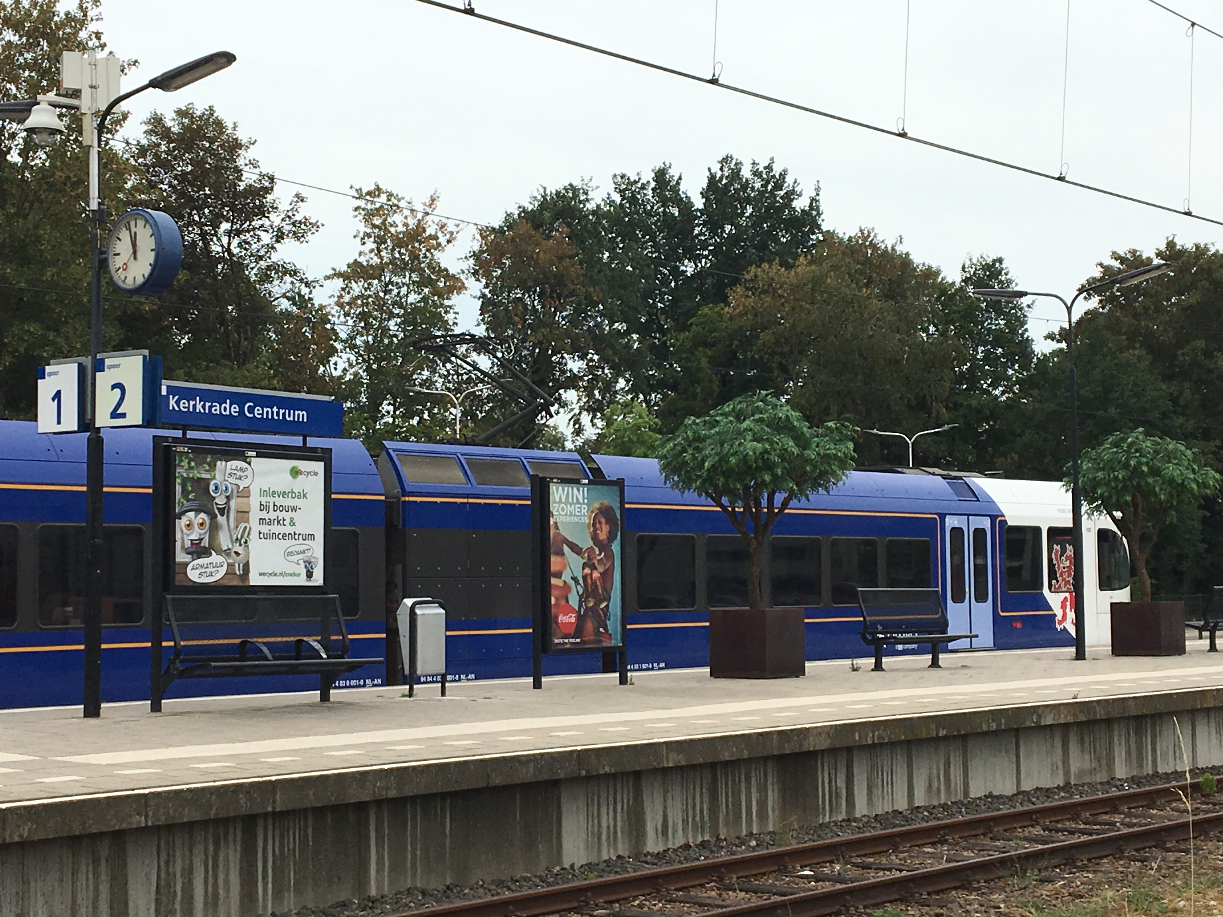 Station Kerkrade Centrum in augustus 2018.